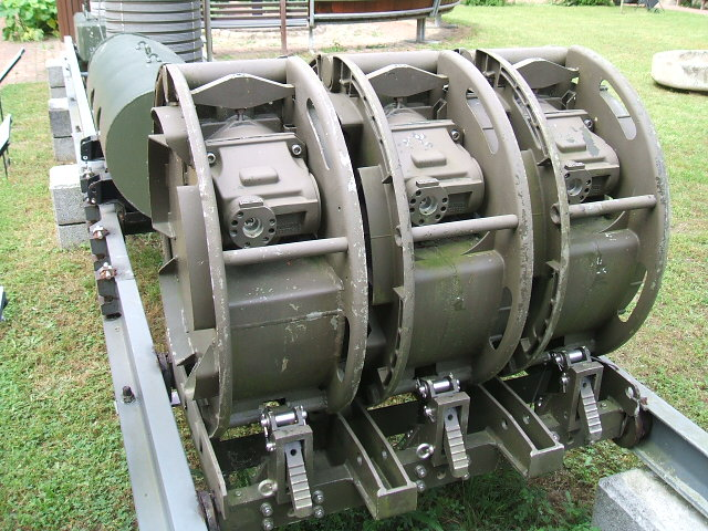 Stralsund, Marinemuseum.